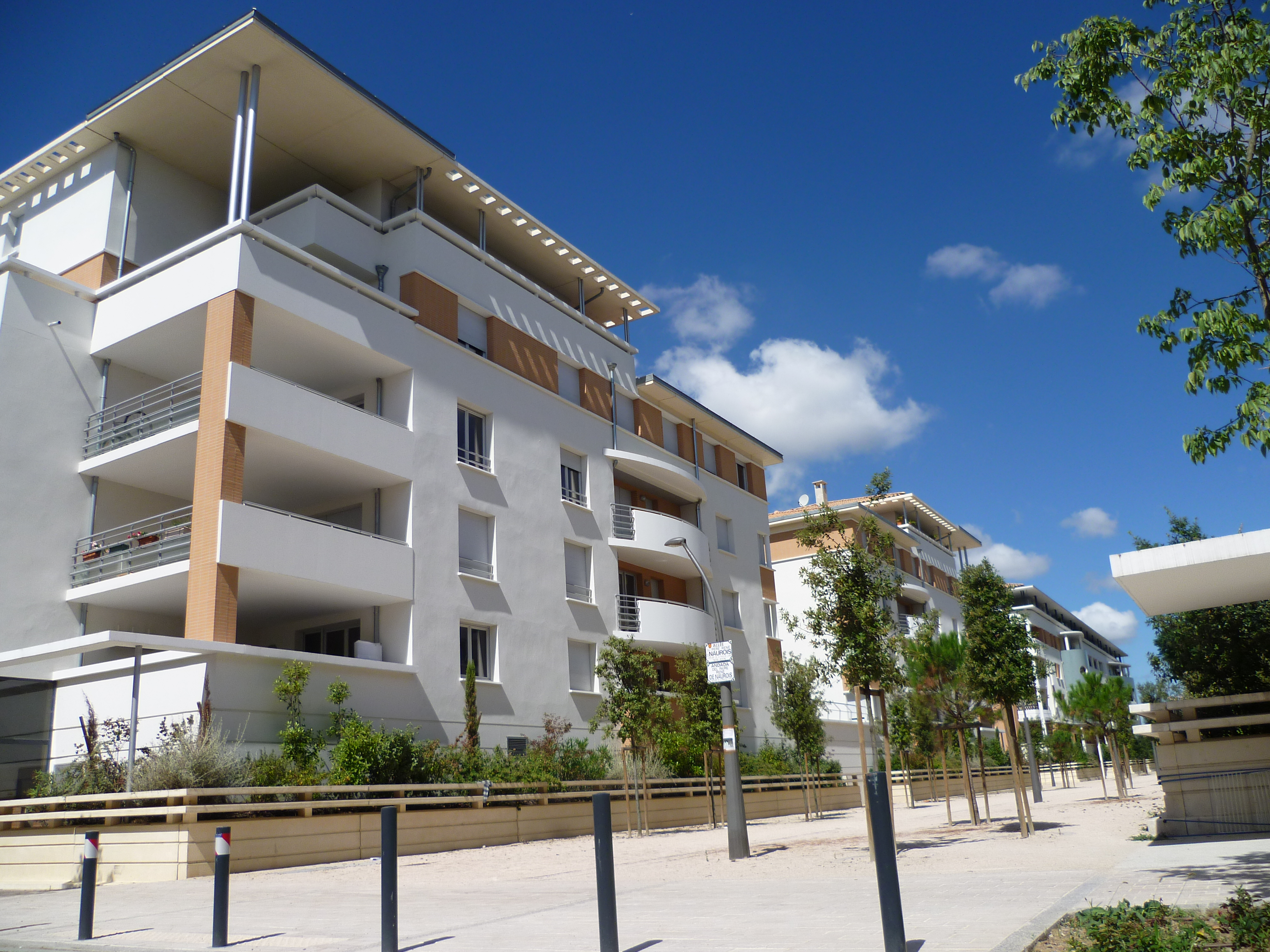 Toulouse (Haute-Garonne, Midi-Pyrénées, France) : L'allée du Père René de Naurois aux Sept-Deniers.